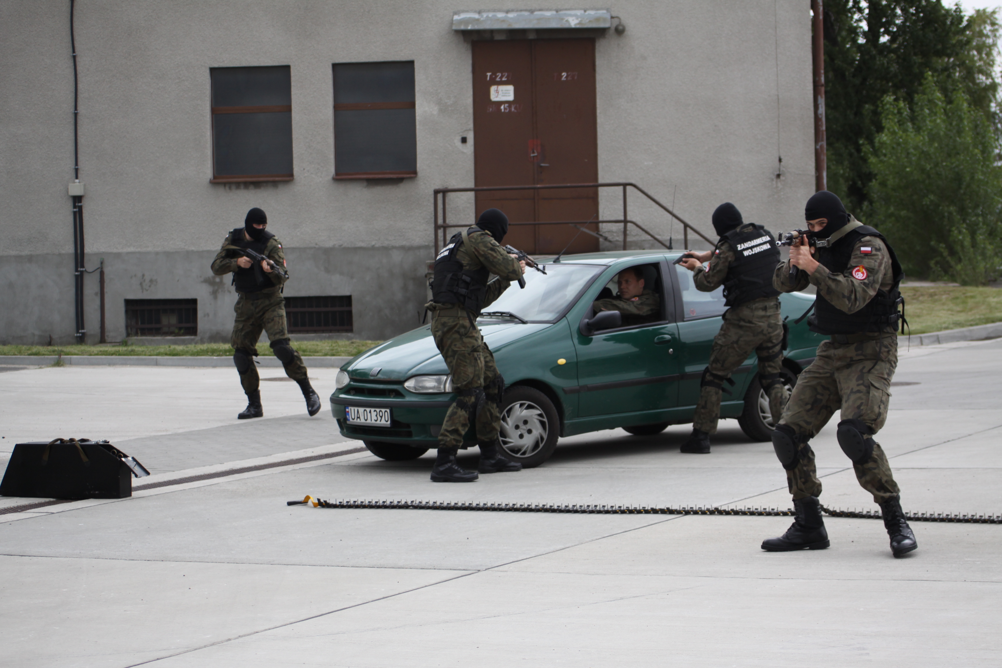 Pokaz zatrzymania sprawcy przestępstwa w pojeździe przez ŻW w Gdyni z okazji Święta 13 czerwca 2010 r.